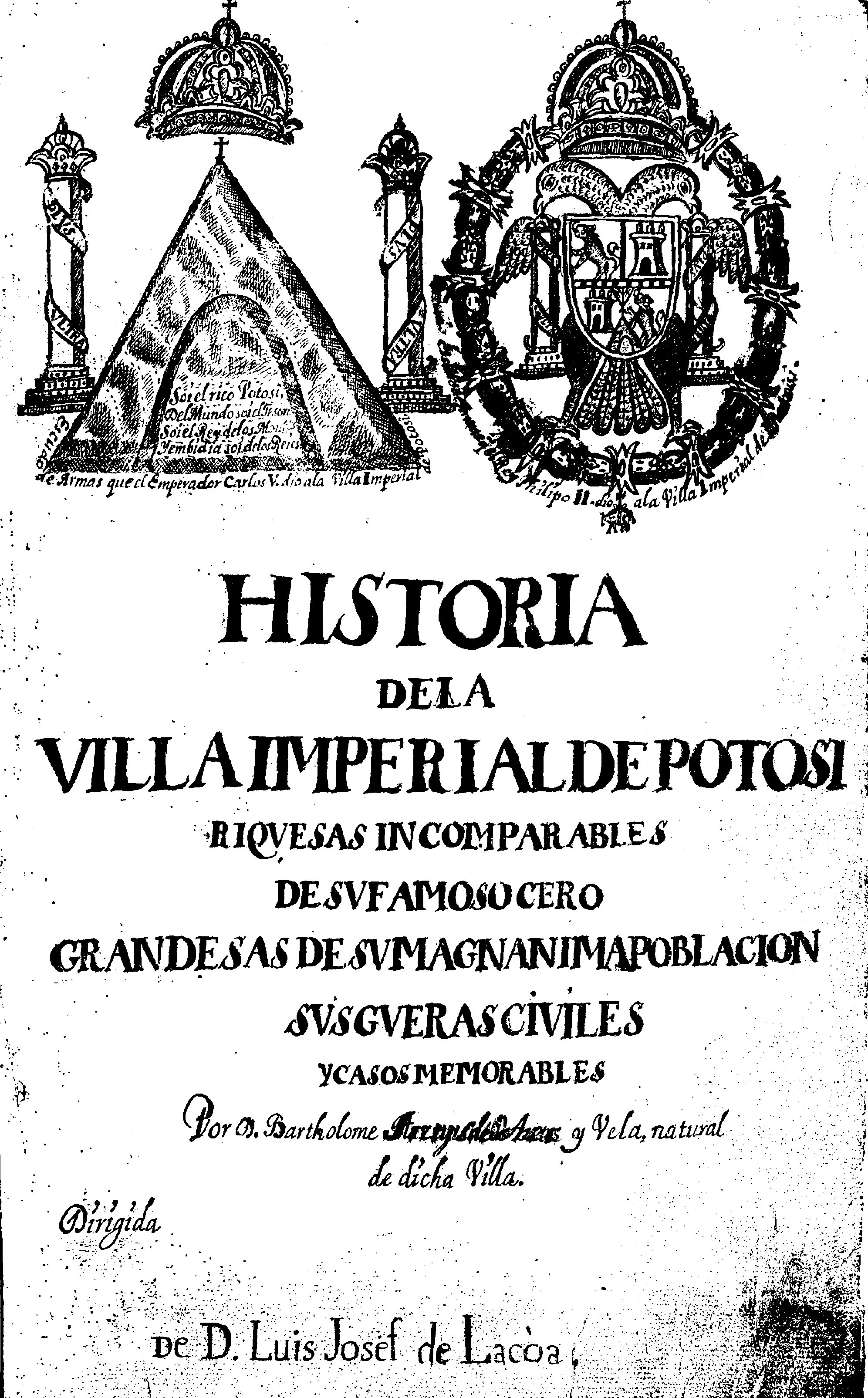 Página inicial de la Historia de la Villa Imperial de Potosí de Bartolomé Arzáns de Orzúa y Vela